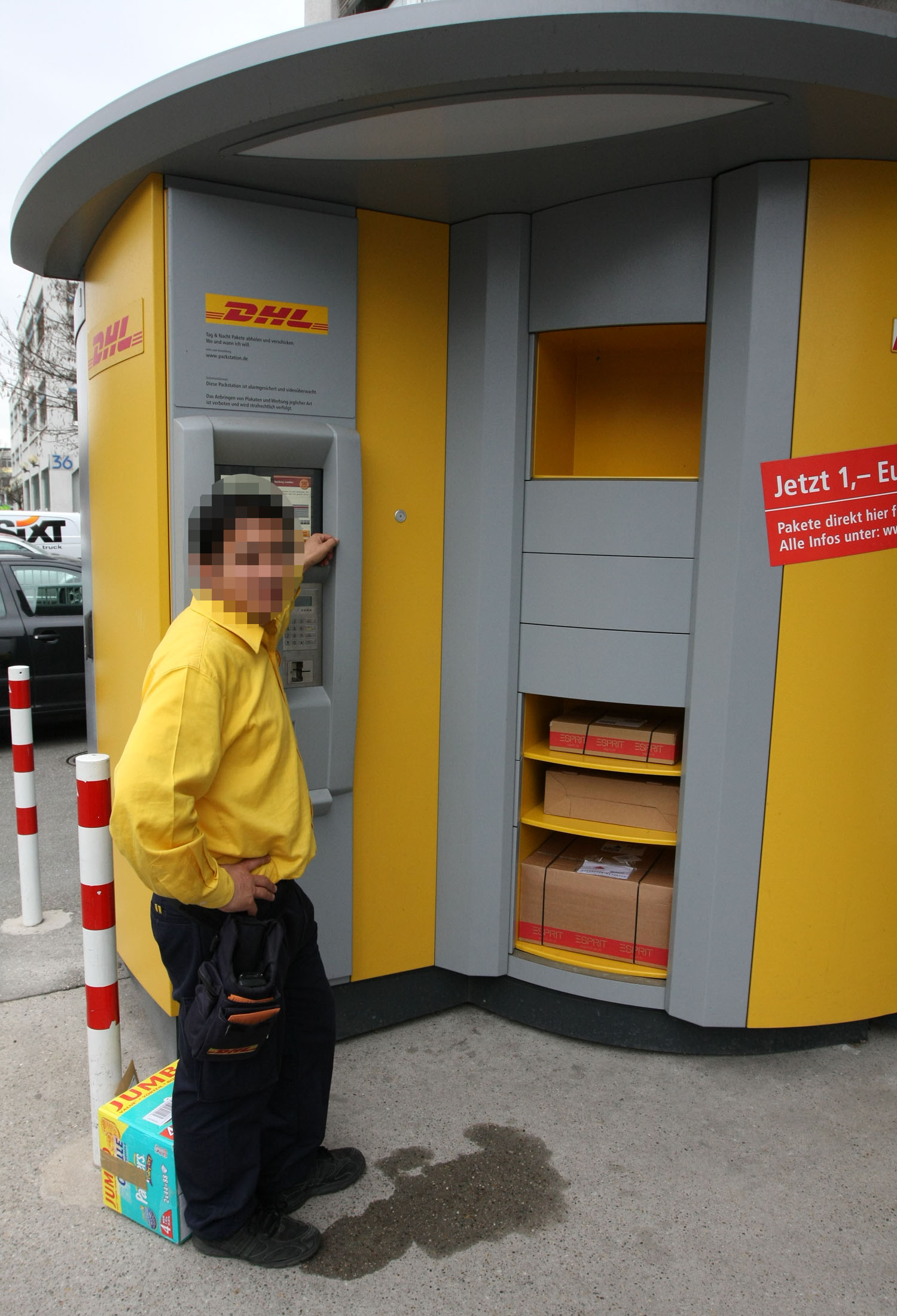 Ein DHL-Mitarbeiter befüllt in Ludwigsburg (Baden-Württemberg, Deutschland) eine sog. Packstation mit Paketen und Päckchen. An dem Automaten können Kunden rund um die Uhr Pakete aufgeben und abholen.